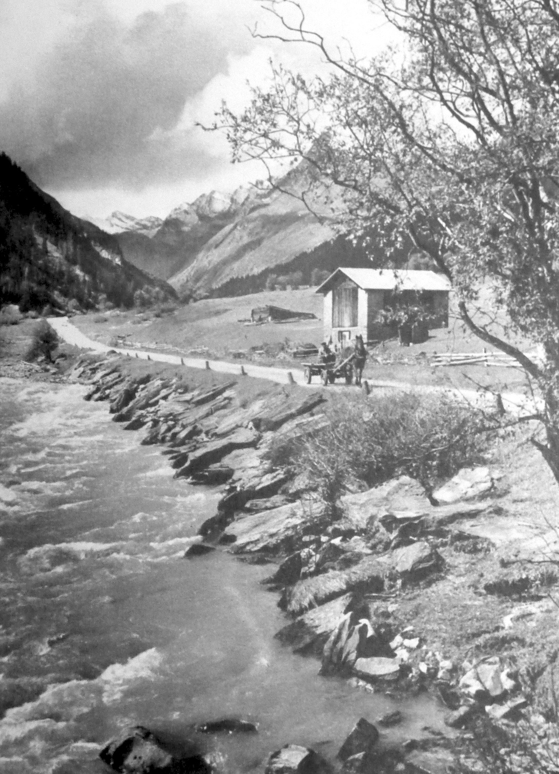 Rheinwald bei Splügen um 1920